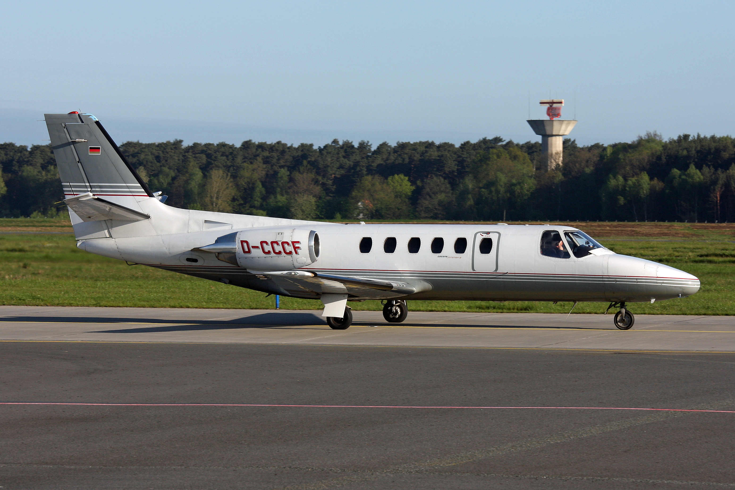 IMG_1737 X